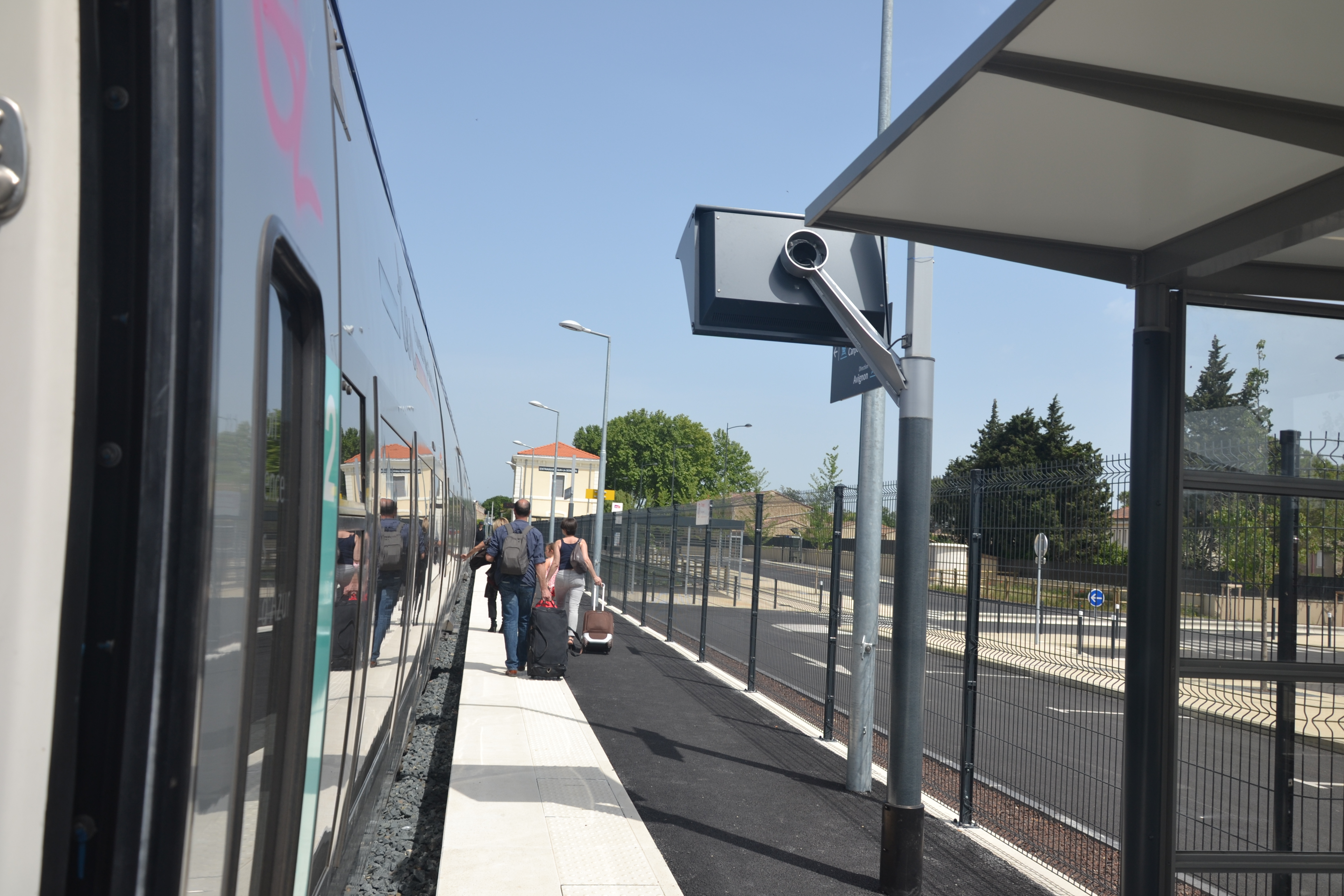 trains à quai à Entraigues